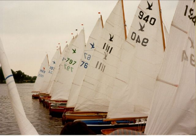 Meerder sterns